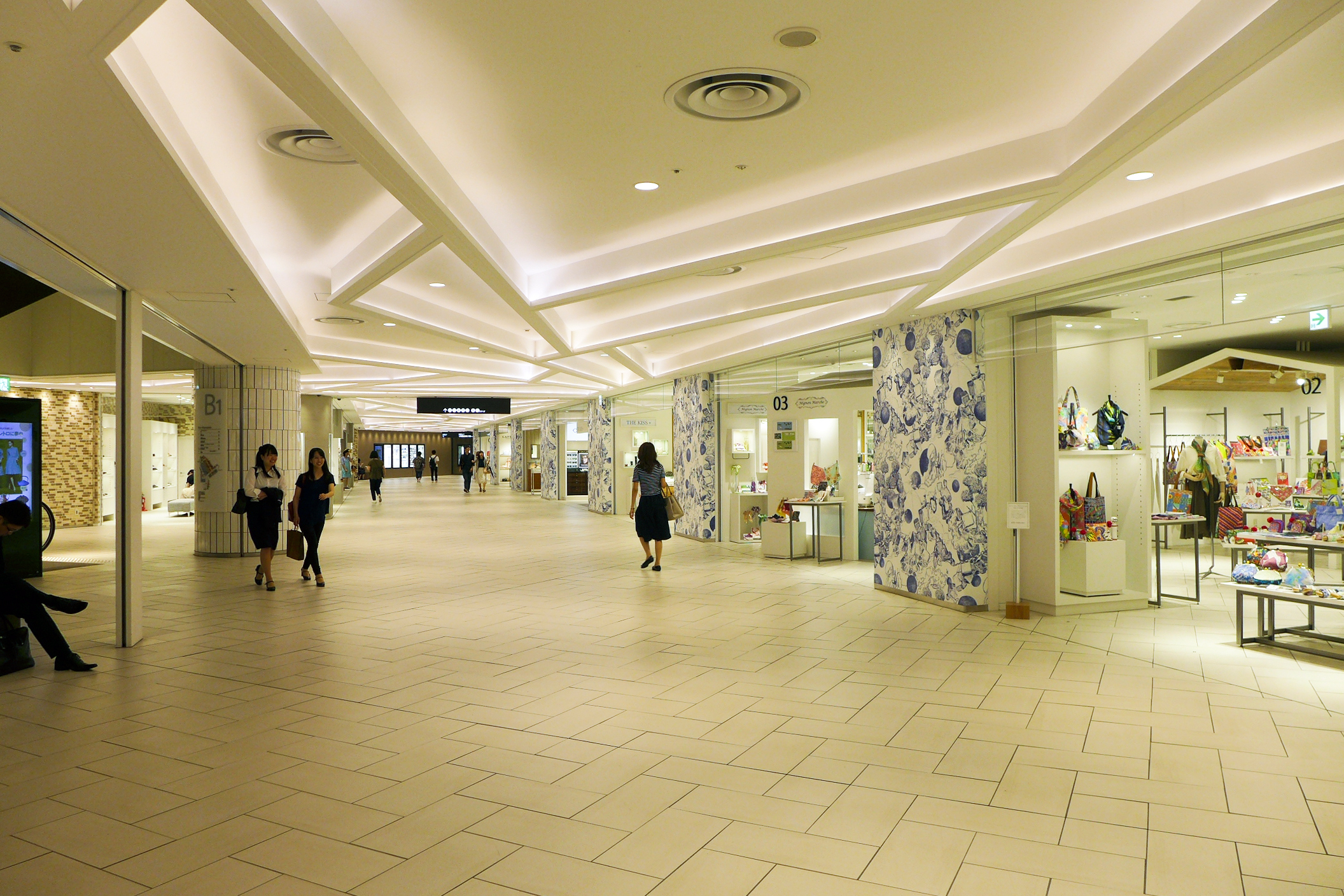 DAINAGOYA BUILDING Basement Arcade